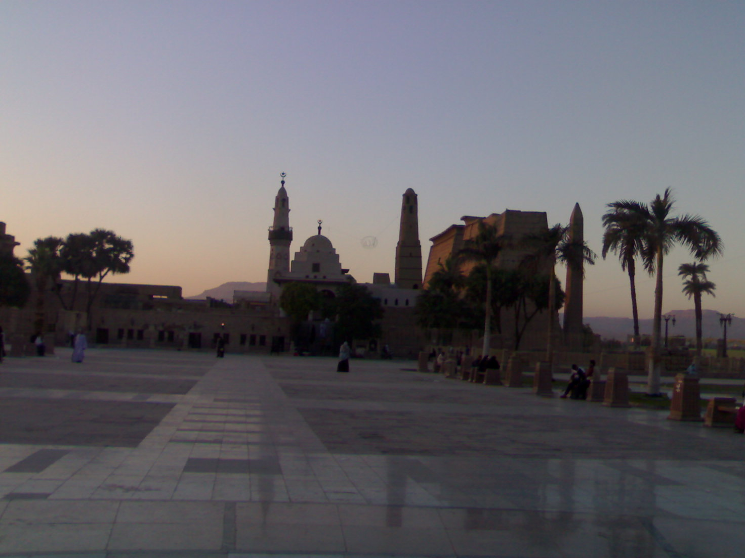 ميدان أبي الحجاج بالأقصر، ويظهر في الخلفية مسجد أبي الحجاج الأقصري.